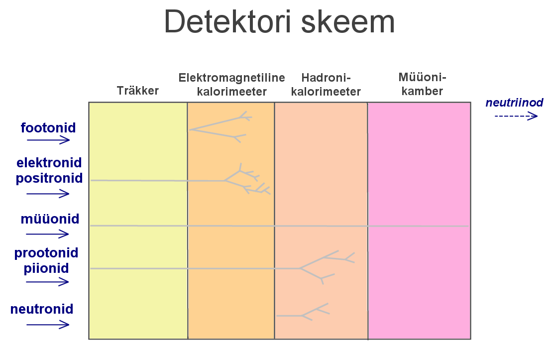 Tegin eri skeemide põhjal